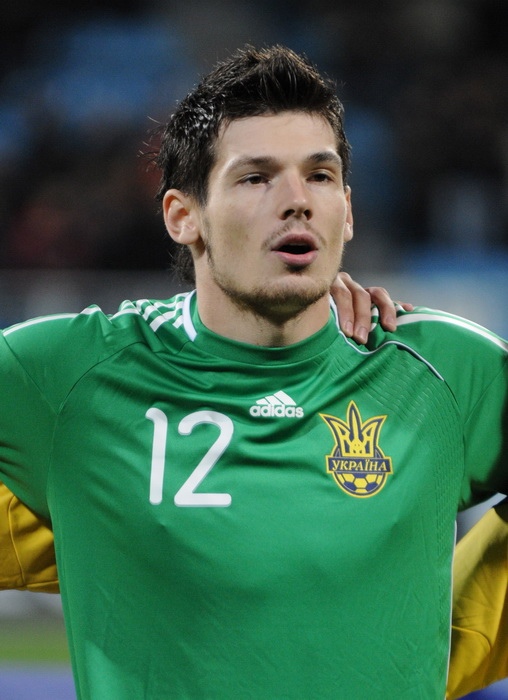 Денис Бойко, украинский футболист, вратарь криворожского «Кривбасса»